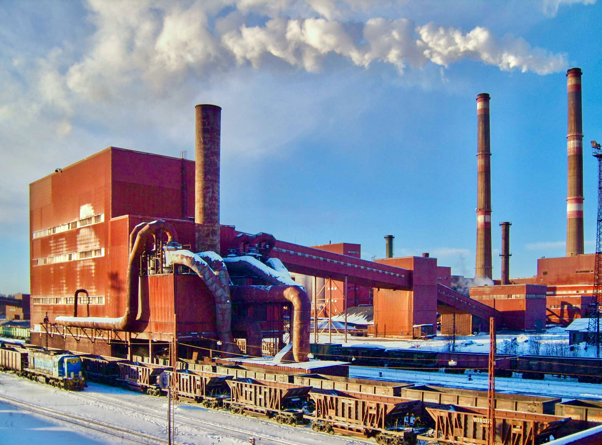 Фабрика по производству окатышей Костомукшского ГОКа (Карельский окатыш, Северсталь)